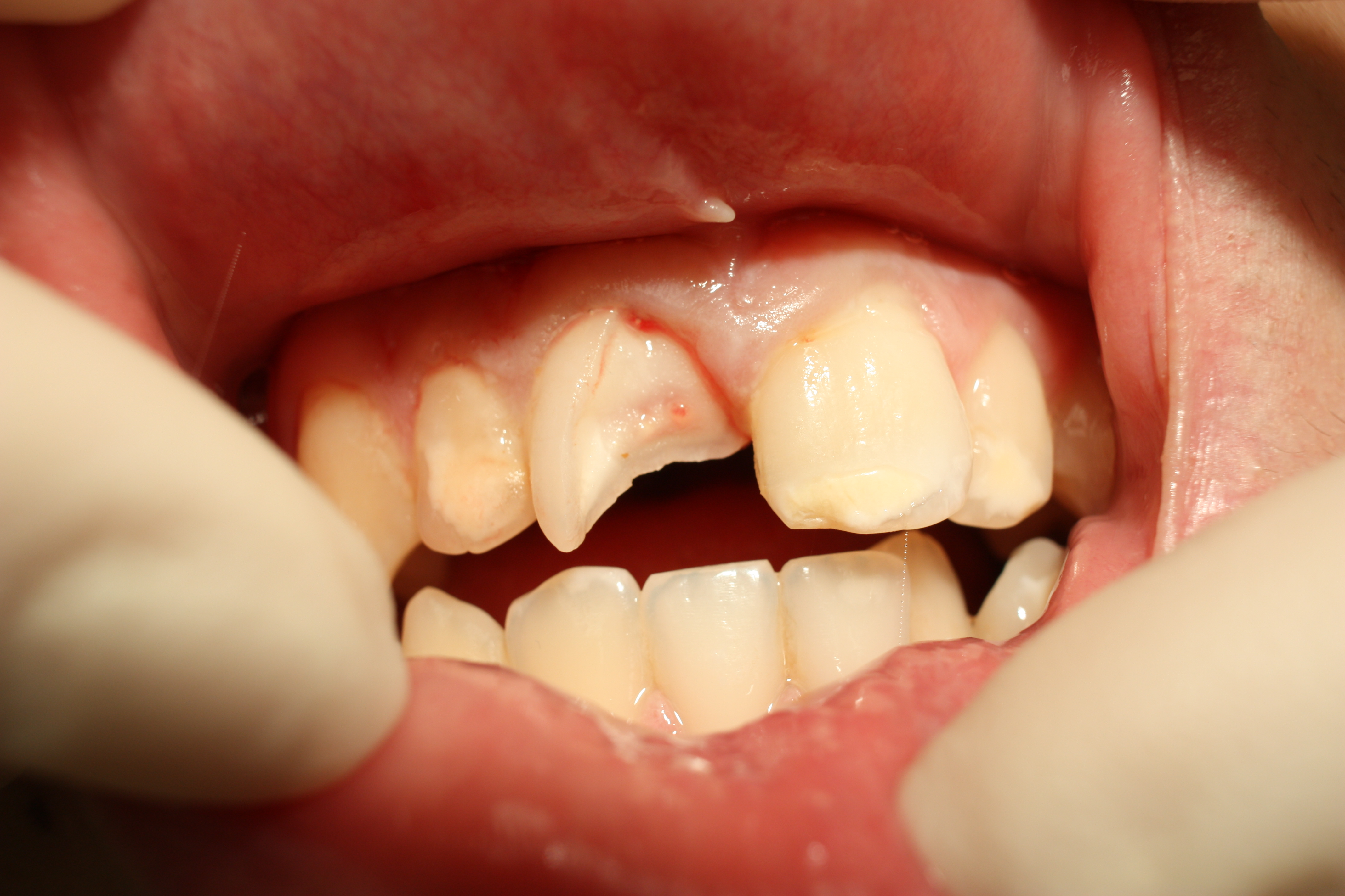 Behandlunsschritte eiens Frontzahntraumas - Kronenfraktur mit Pulpaeröffnung Zahn 11; 16 Jahre alter Patient